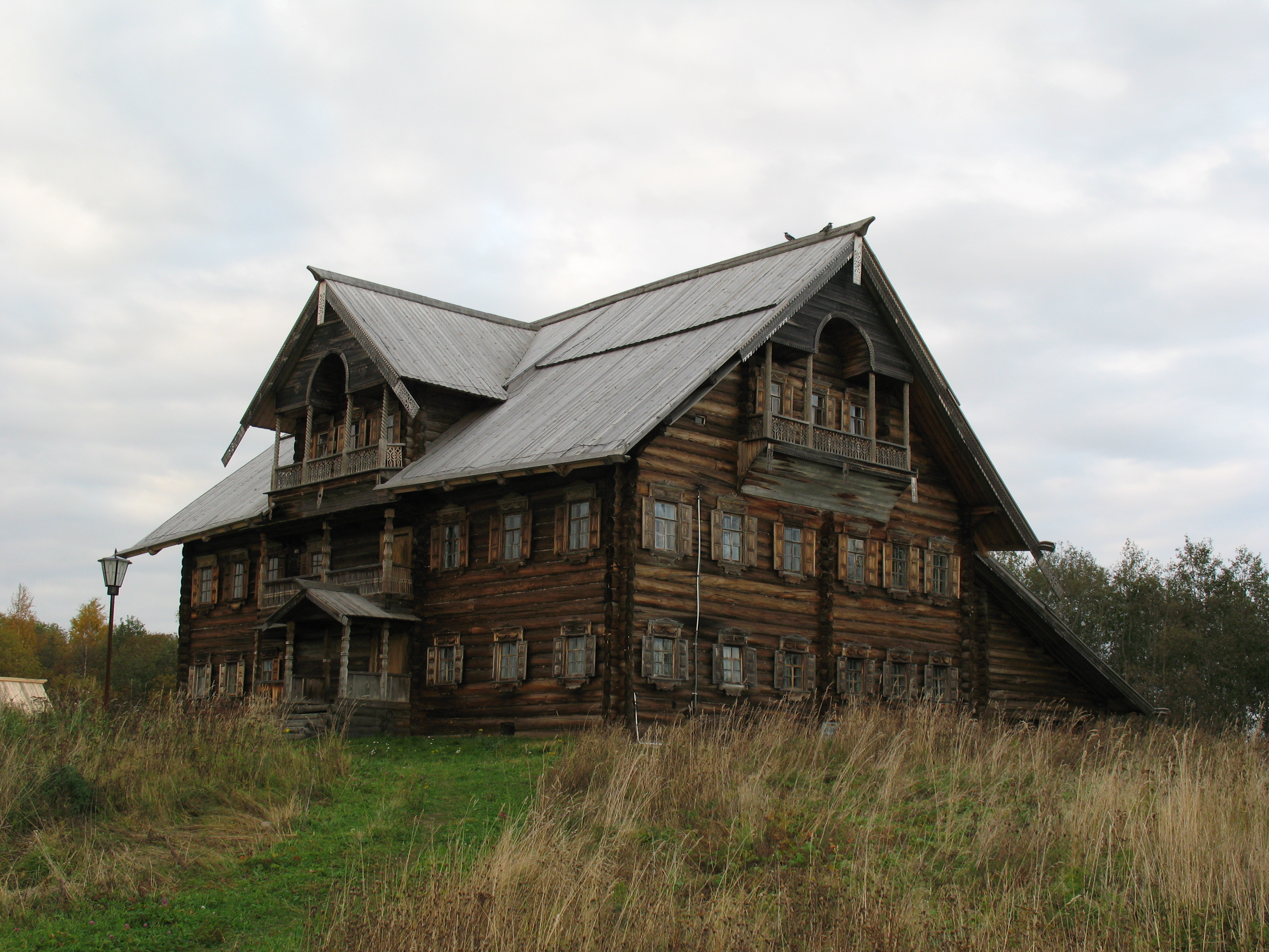 Дом Сергина из д. Мунозеро (Республика Карелия, Петрозаводск, о. Кижи, д. Васильево)